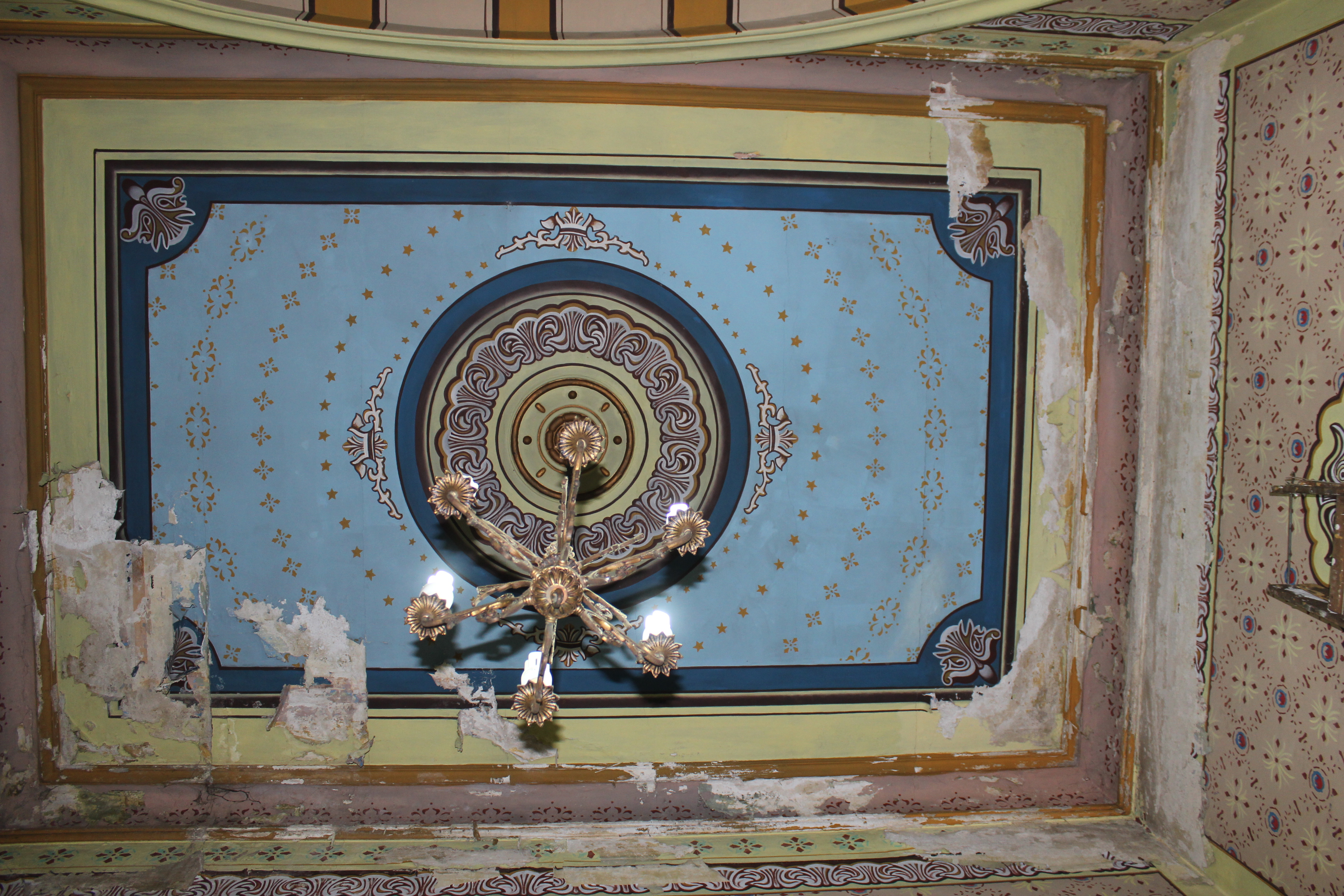 Cúpula da capela lateral direita da Igreja Nossa Senhora do Rosário dos Homens Pretos, em São Paulo (SP), Brasil.